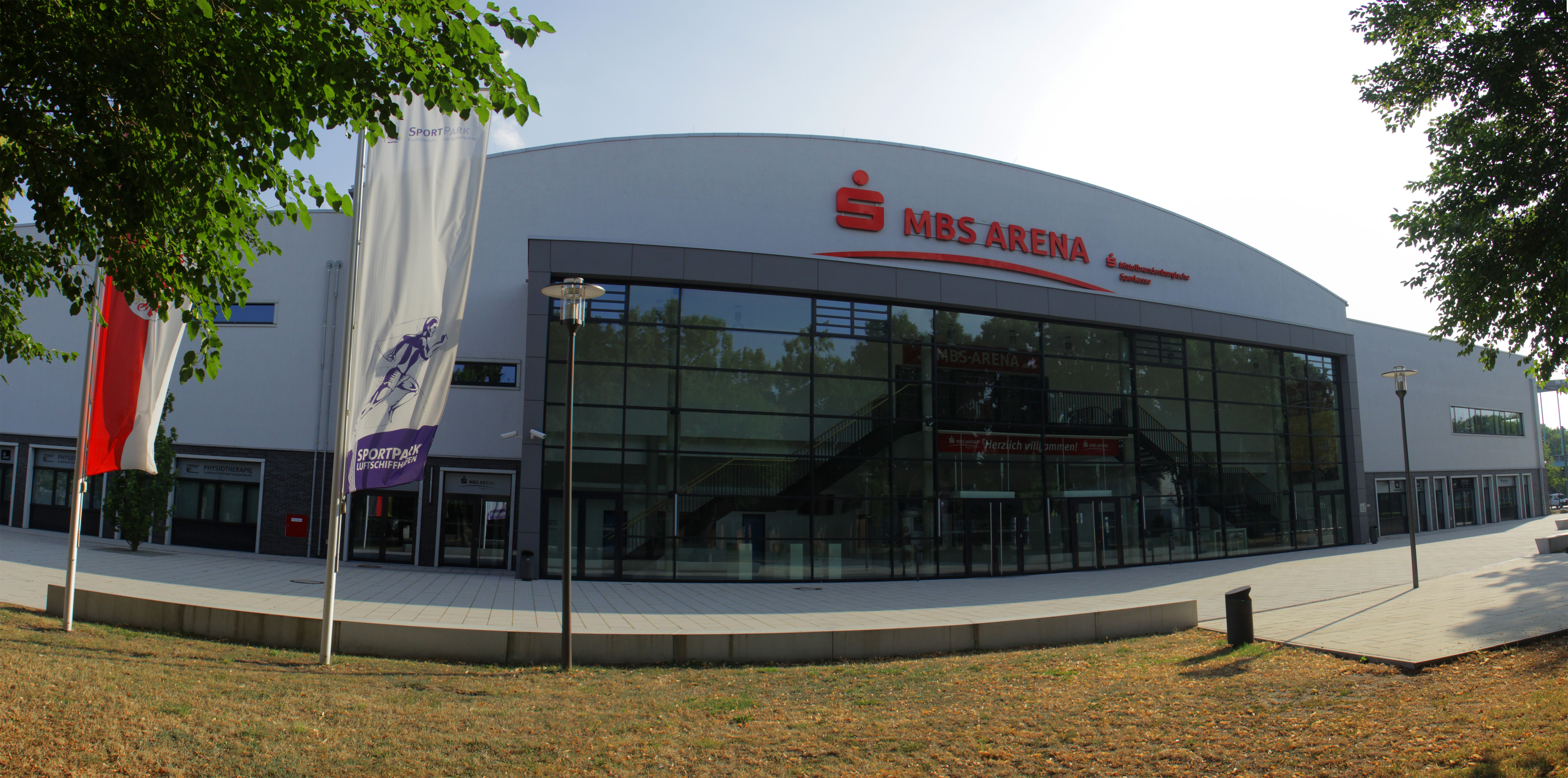 Panorama der MBS Arena Potsdam im Luftschiffhafen.